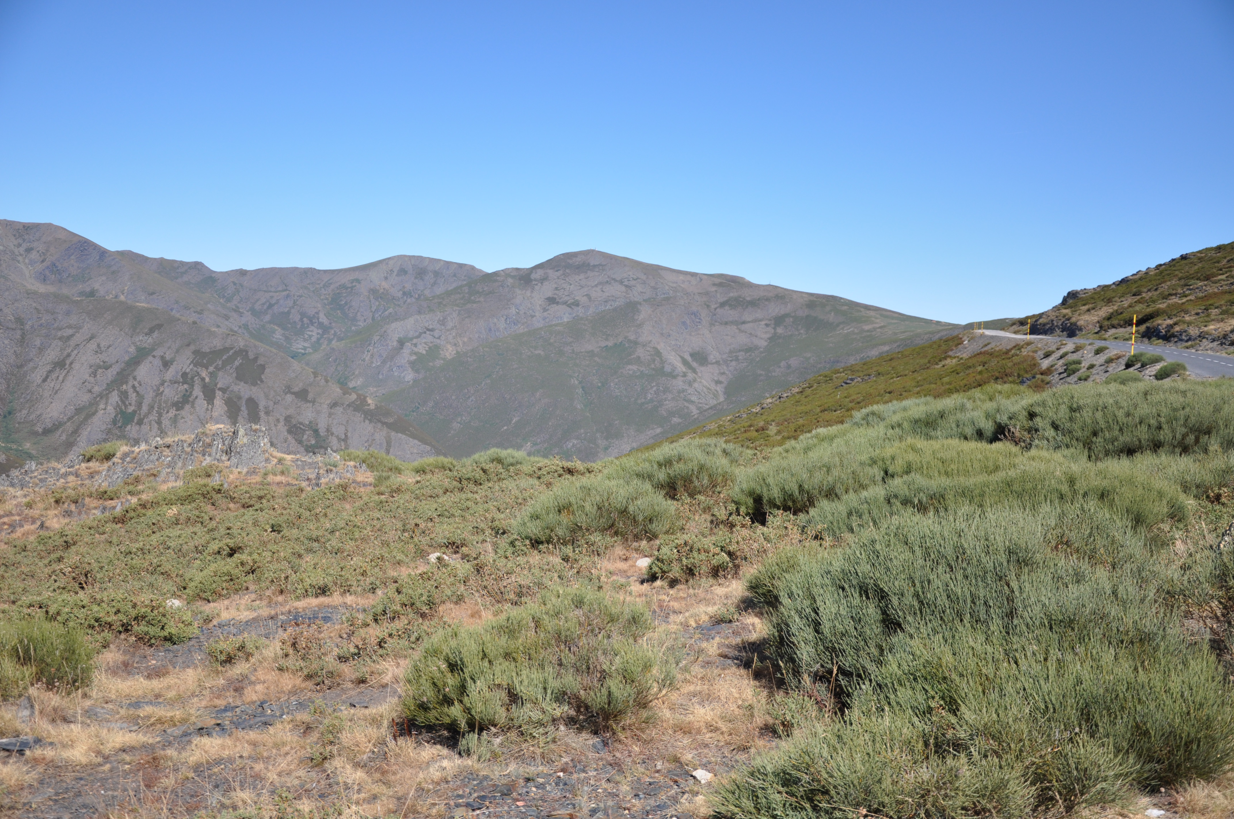 Alto de las Berdianías. Alto río Cabo. Piornos y brezos en el Teleno, León,España. This is a photography of a Special Area of Conservation in Spain with the ID: ES4130117. Natura2000 entry, EEA entry